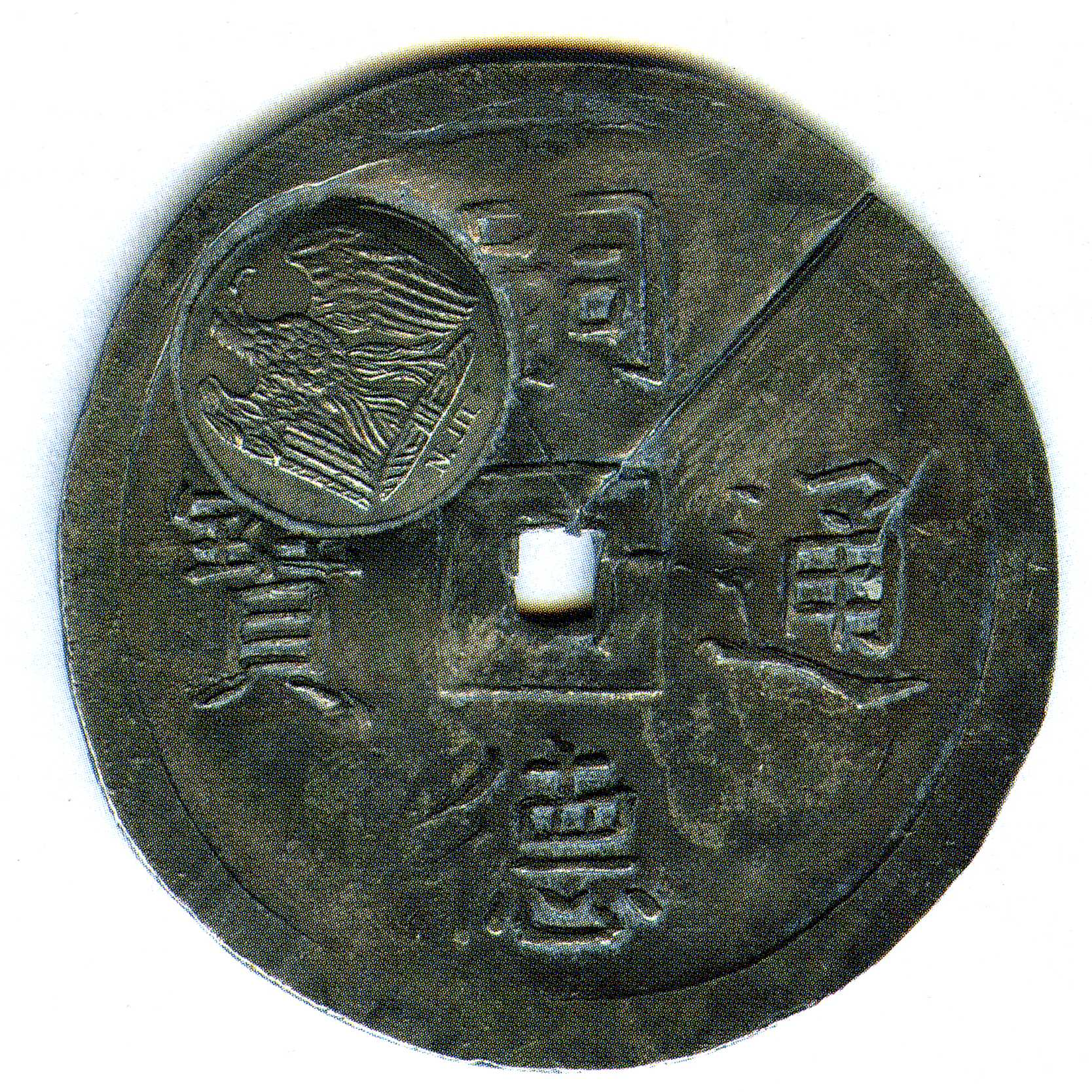 Moneda annamita con resello ustilizada en Indochina francesa